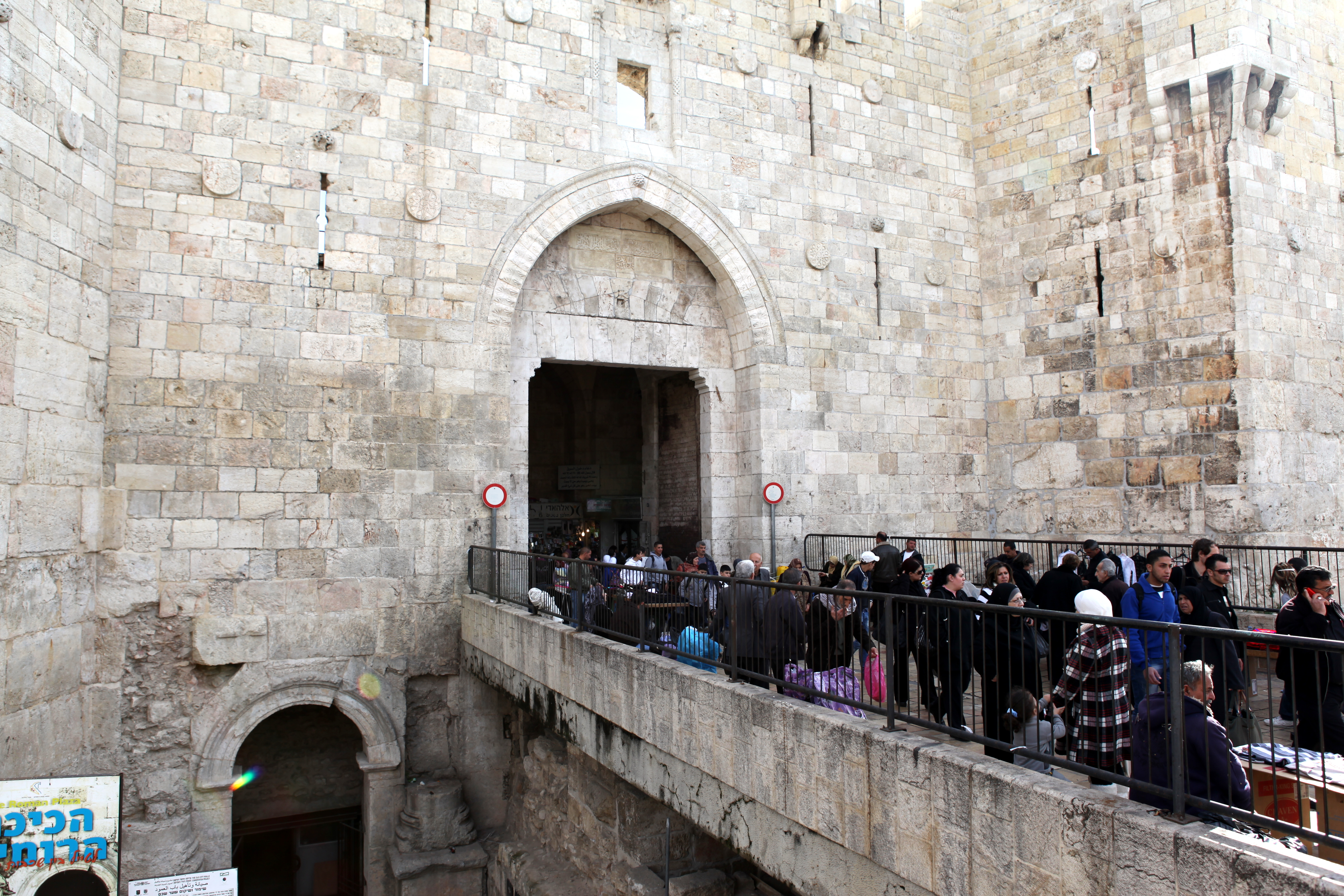 Damascus Gate Jerusalem